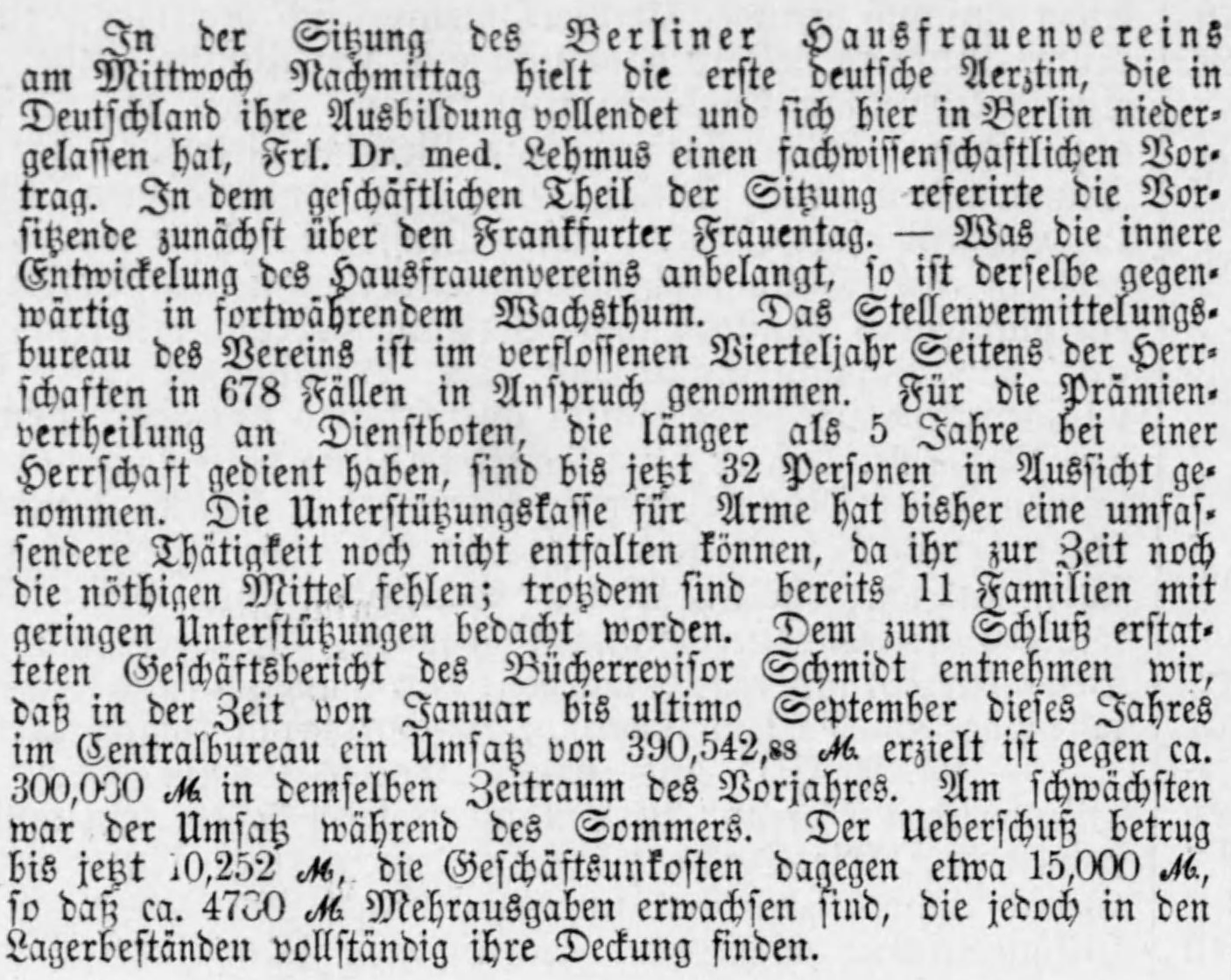 Bericht über eine Sitzung des Berliner Hausfrauenvereins (vermutlich vom 25.10.1876)